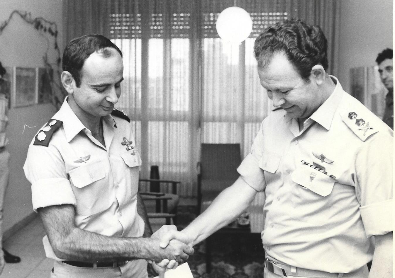 הרמטכ"ל רב אלוף מרדכי גור מעניק את דרגת האל"מ לגדעון רז כמפקד זירת ים סוף